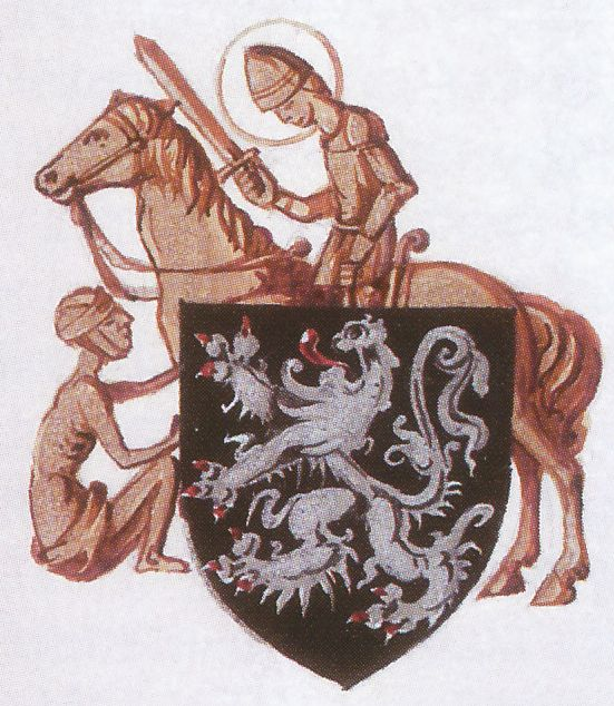 Wapenschild gemeente Welden 1928